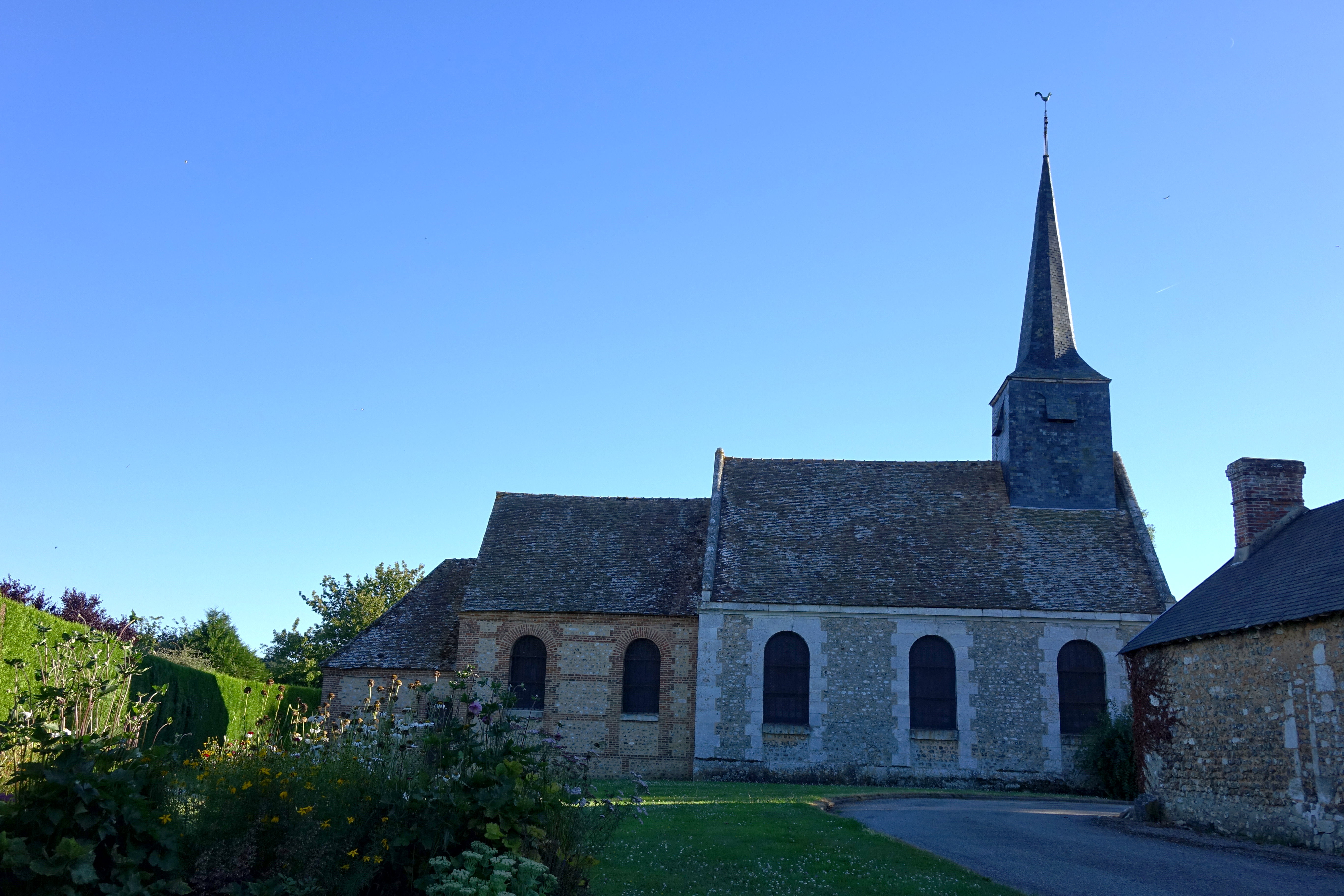 Église Saint-Saturnin à Venon, Eure, France